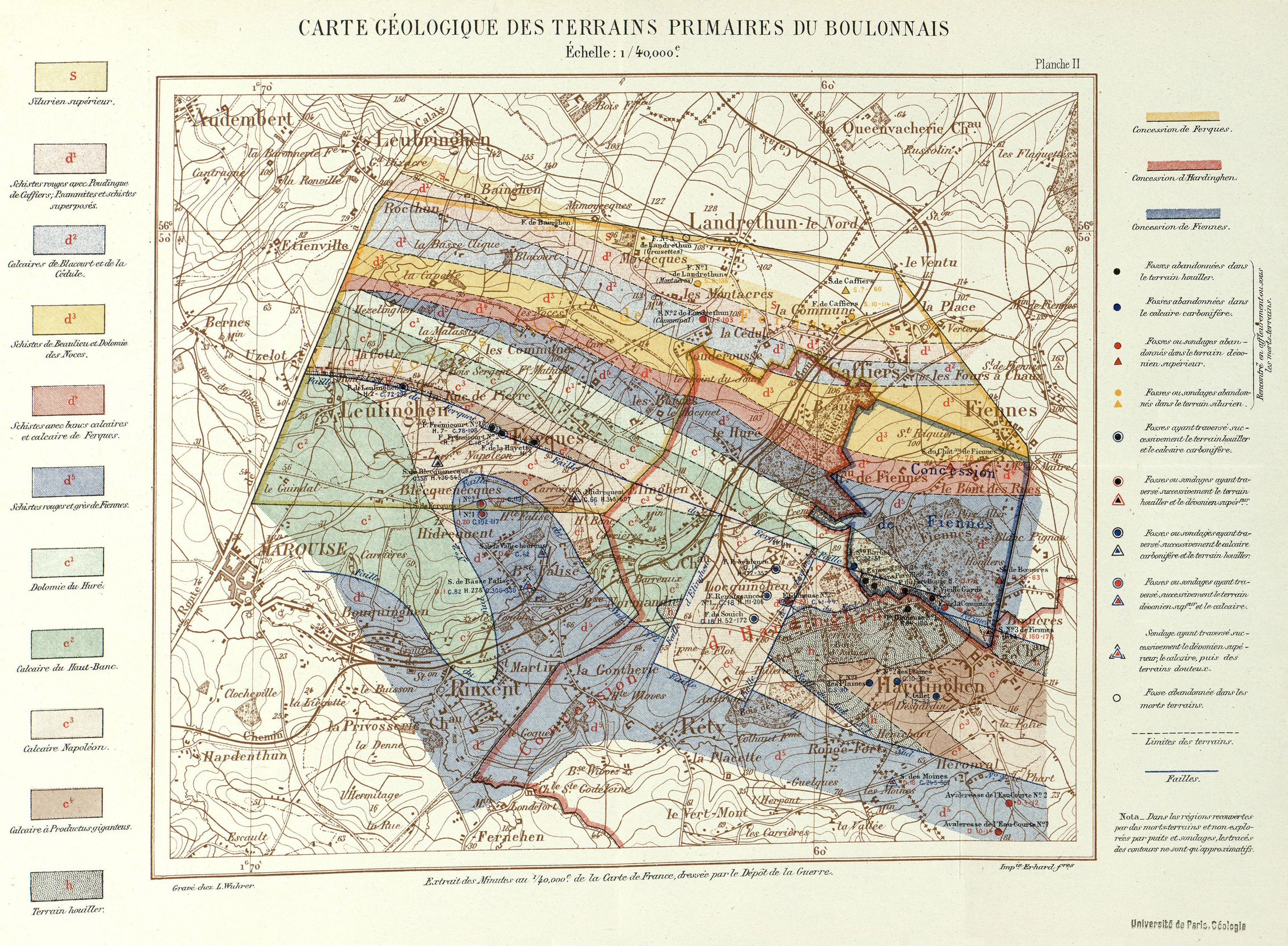 Carte très détaillée, permettant la localisation des puits des Mines du Boulonnais.